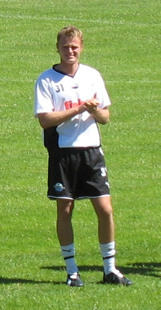 Sebastian Lange, Nachwuchs-Torhüter beim SC Paderborn 07